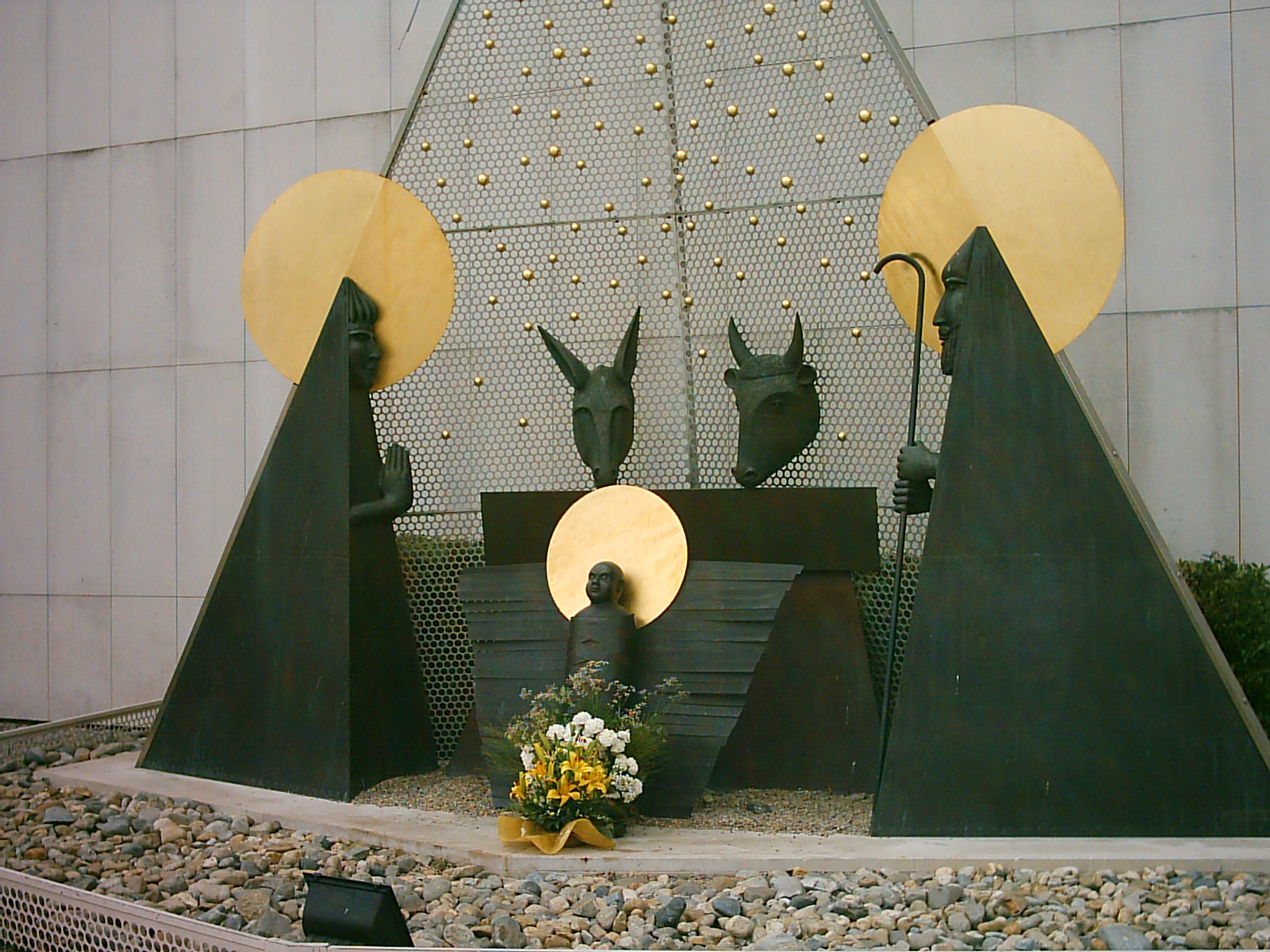 Presépio no Santuário de Fátima, Fátima, Portugal